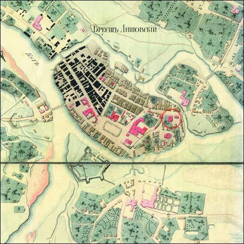 Царква Святых Апосталаў Пятра і Паўла на мапе Берасця 1823 г